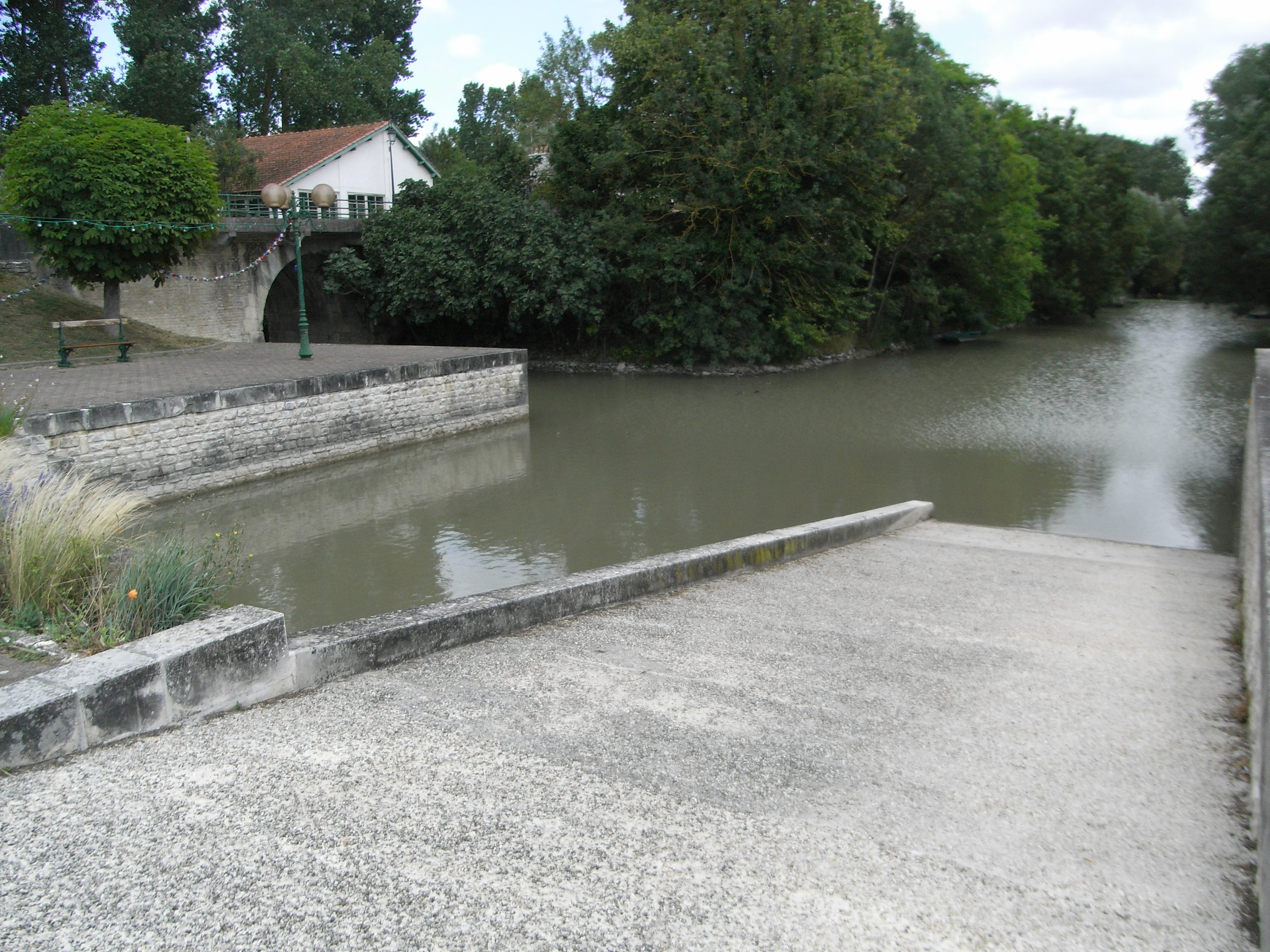 Port relié au canal du Mignon à La Grève-sur-Mignon commune de Charente-Maritime dans le marais poitevin (France)